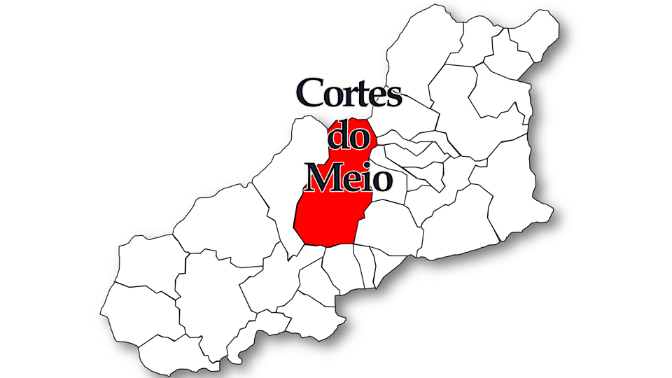 População